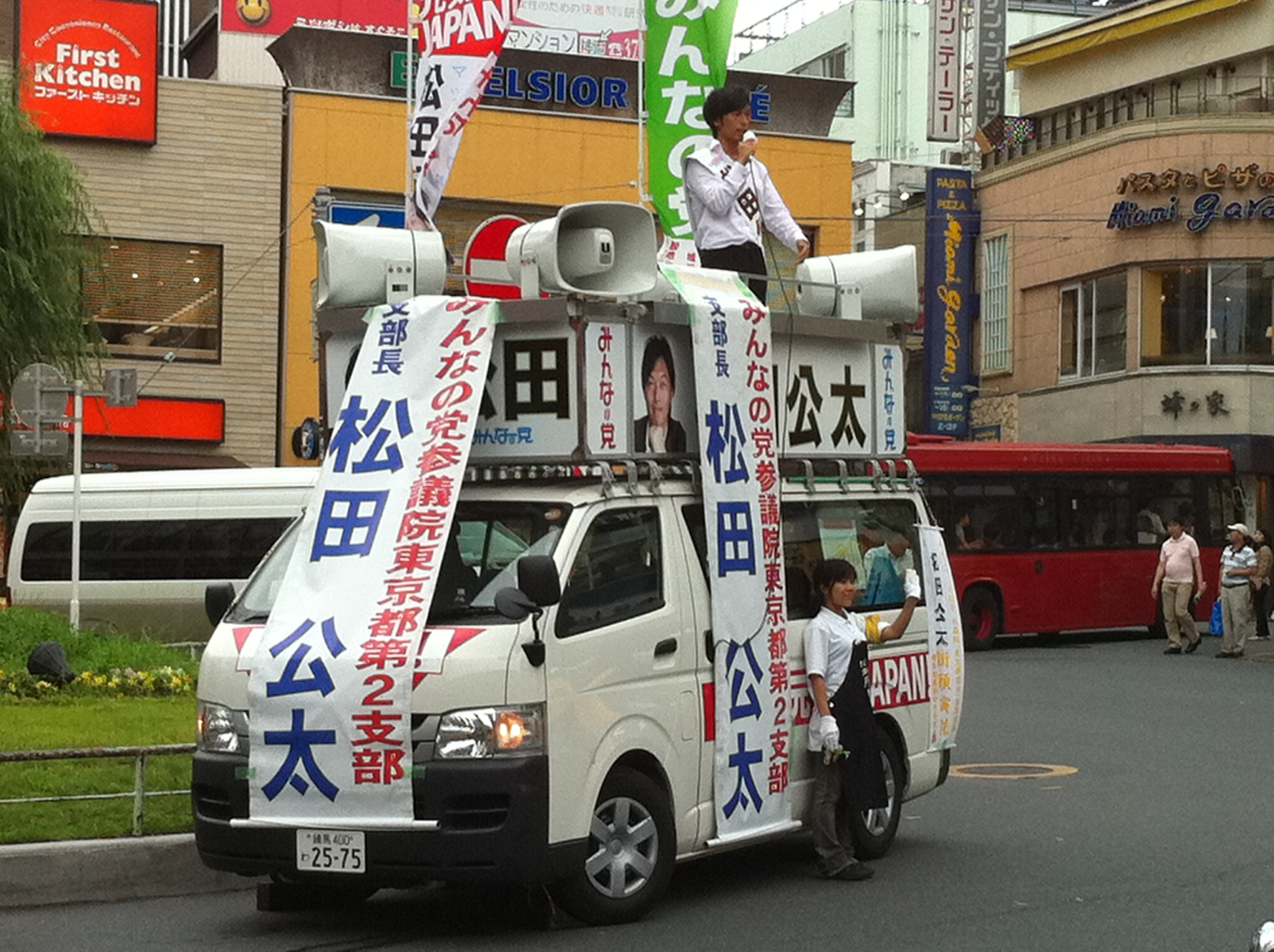 Back Camera 松田公太